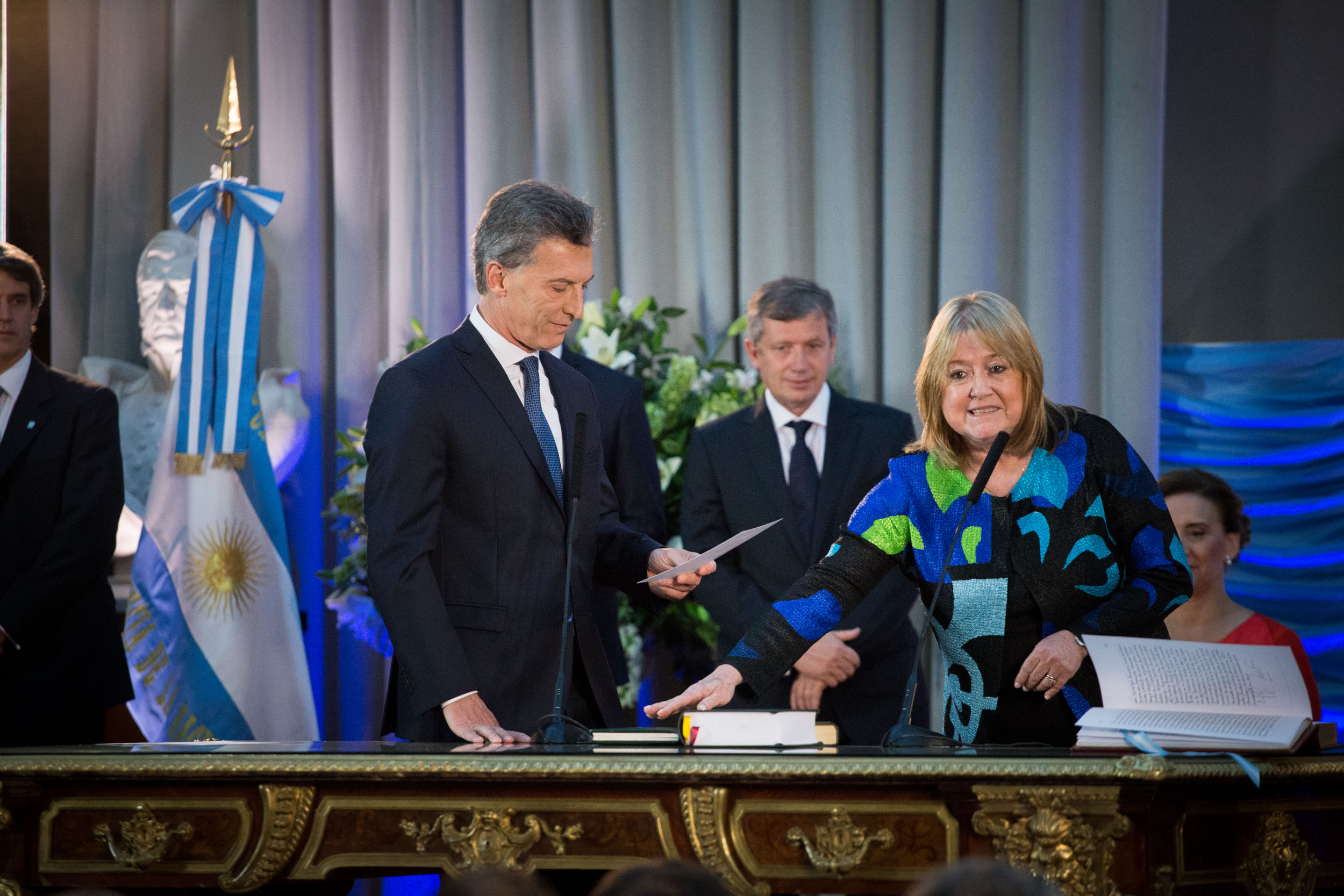 Susana Malcorra jura como Canciller de la Argentina.